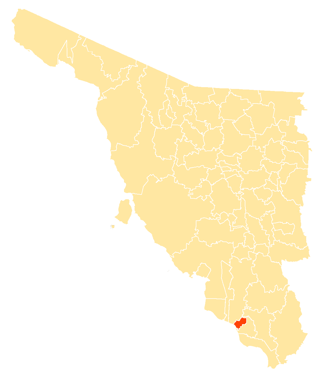 Municipio en Sonora, México.